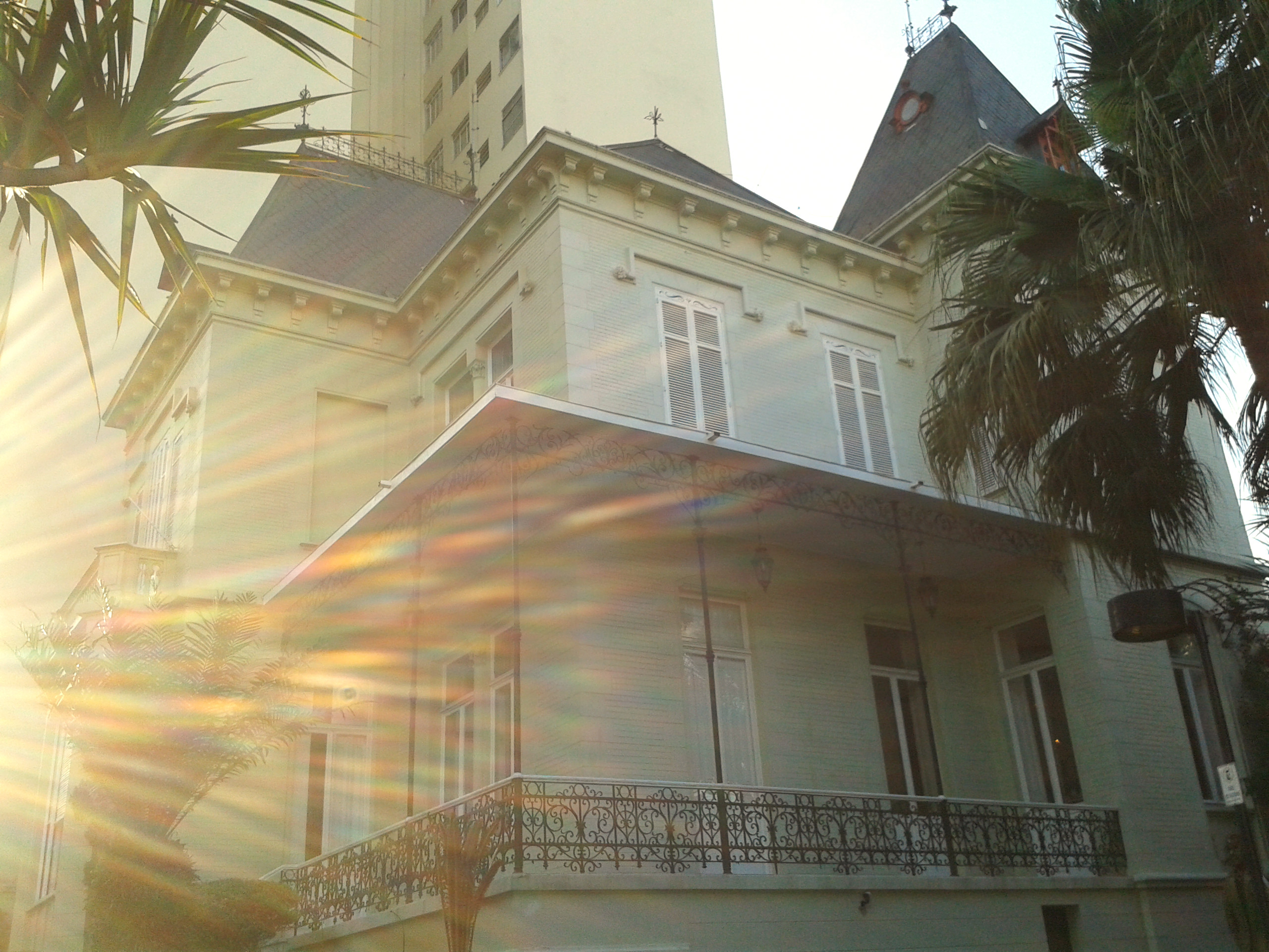 Face leste das Residencias da Família Ramos de Azevedo, em São Paulo (SP), Brasil